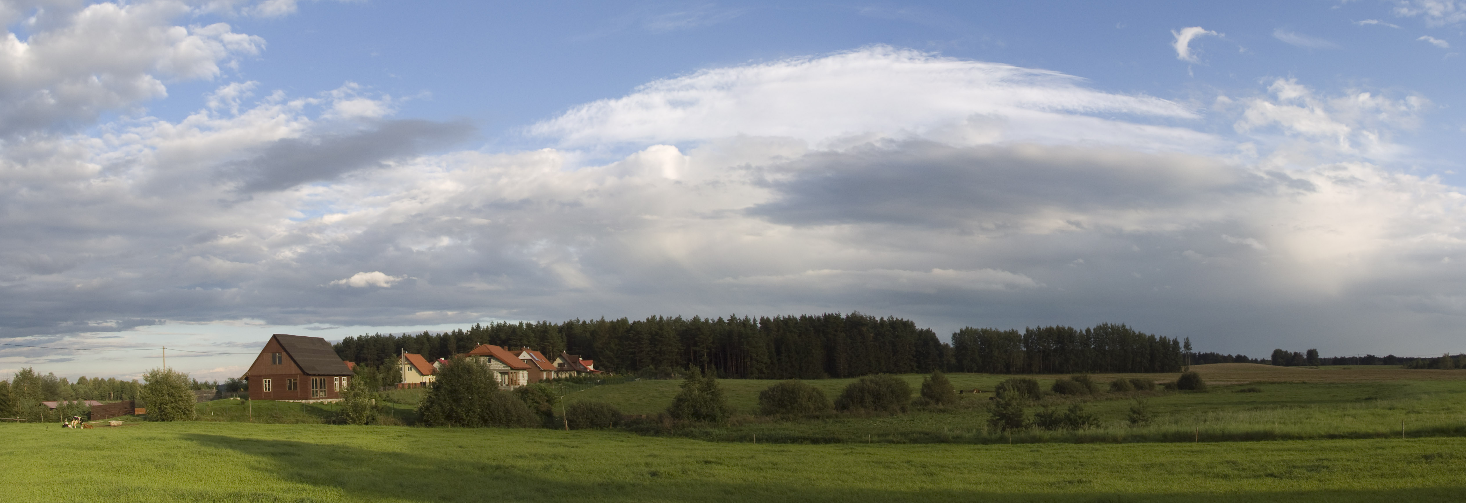 Przerwanki